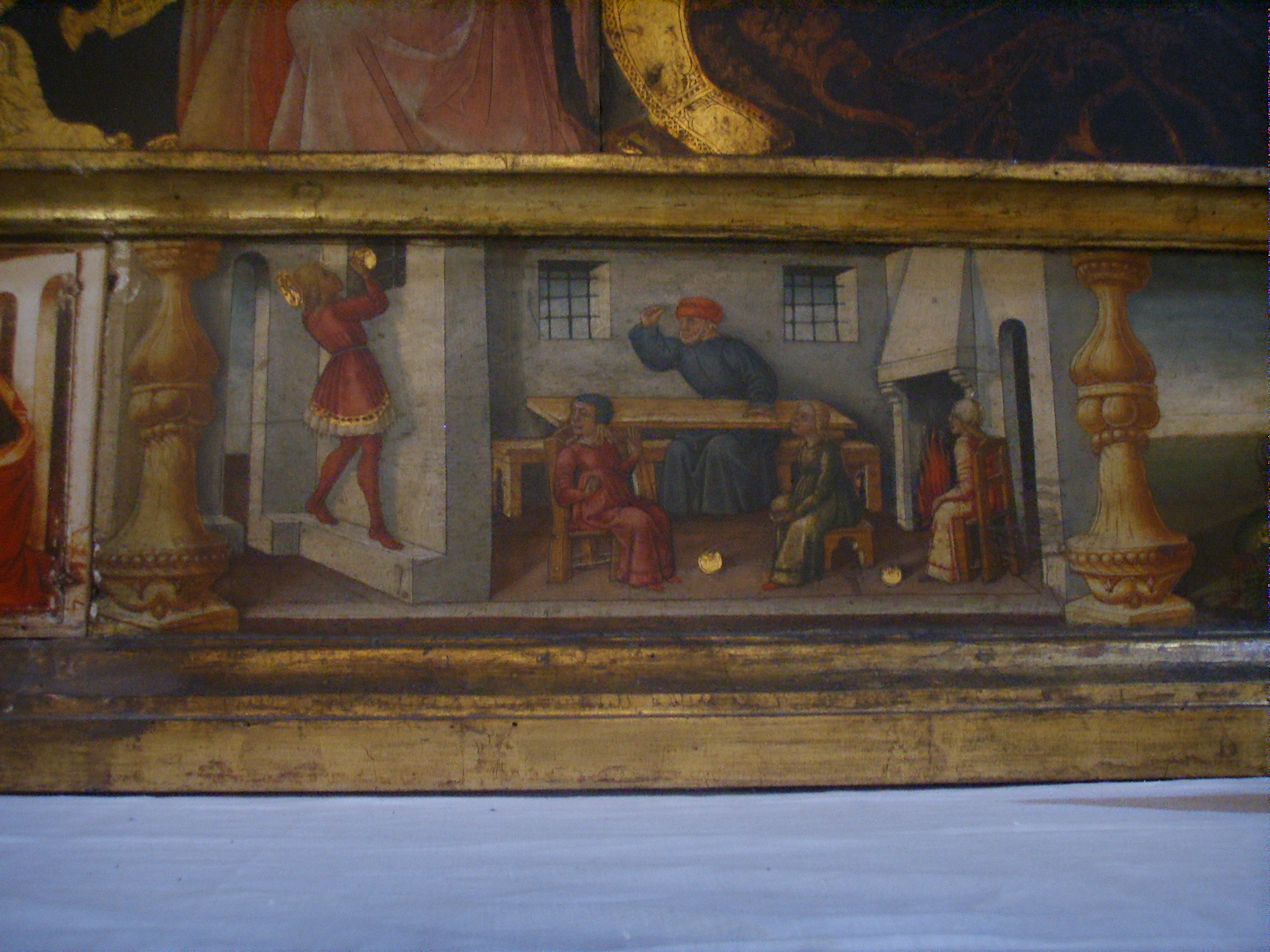 San_Giovannino_dei_cavalieri church inside view Neri di Bicci, Coronation of the Virgin in Florence, italy